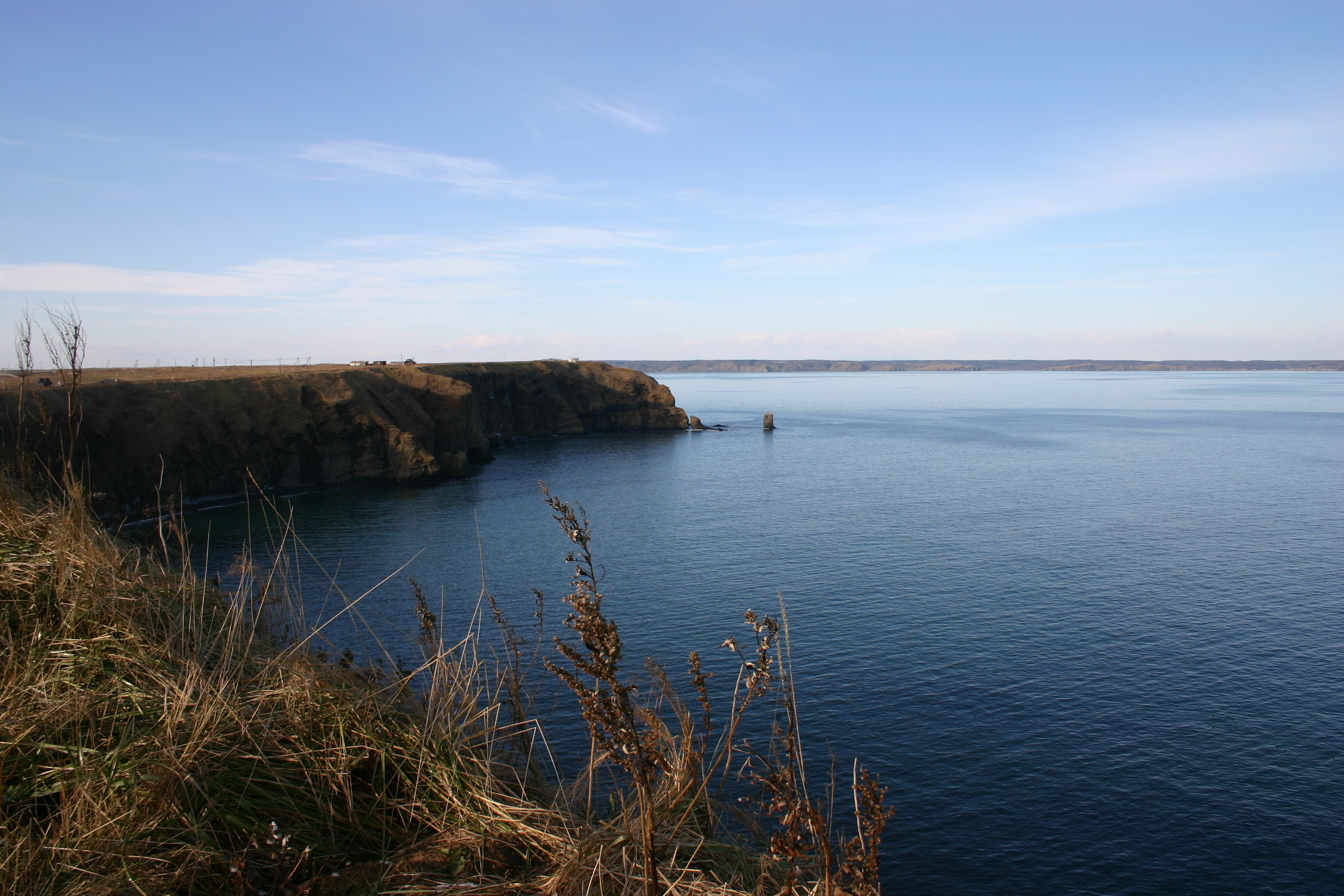 浜中湾 霧多布岬より